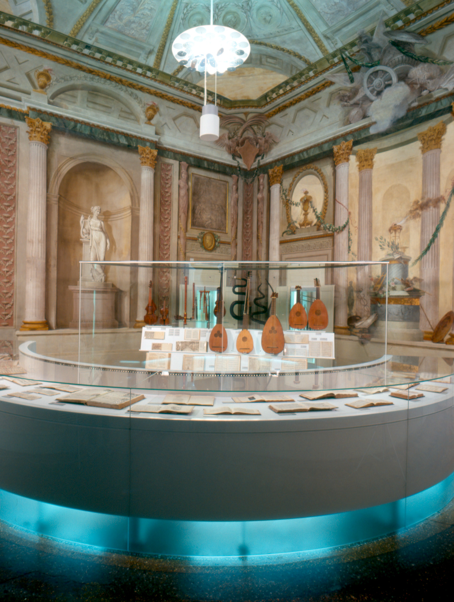 Enrico Tabellini-Museo della musica, 10-03-09, Sala 5 del Museo internazionale e biblioteca della musica di Bologna